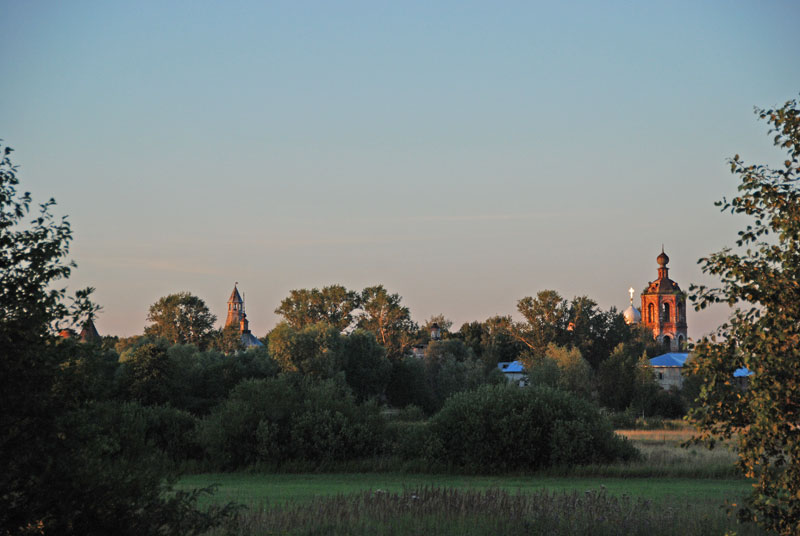 Панорама Николо-Пешношского монастыря в Дмитровском район Московской области. Справа видна монастырская колокольня, слева от нее виден купол и крест восстанавливаемого Сергиевского храма.